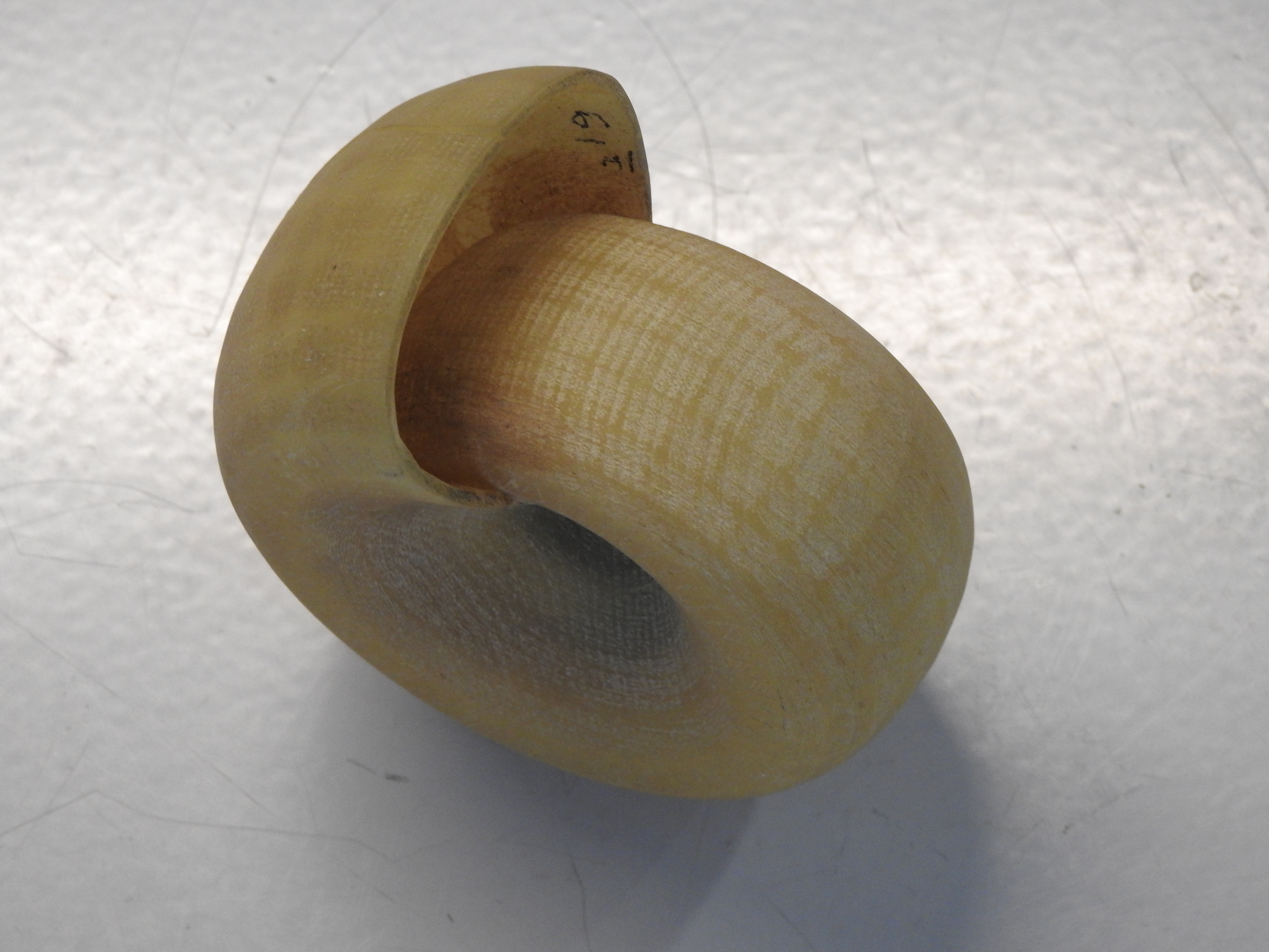 דגם שנבנה על פי משוואה סטריאומטרית